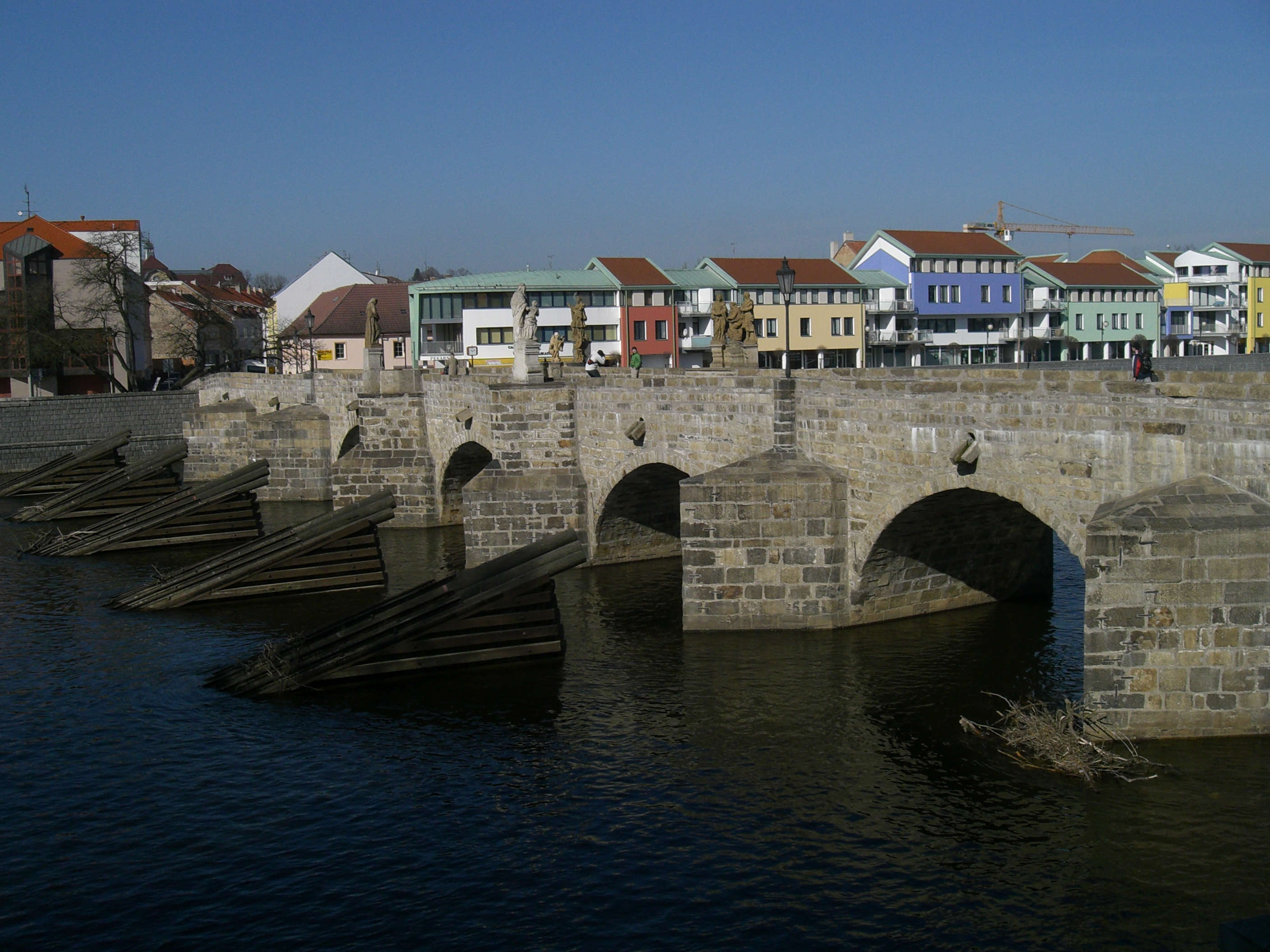 Kamenný most v Písku Písek Stone Bridge